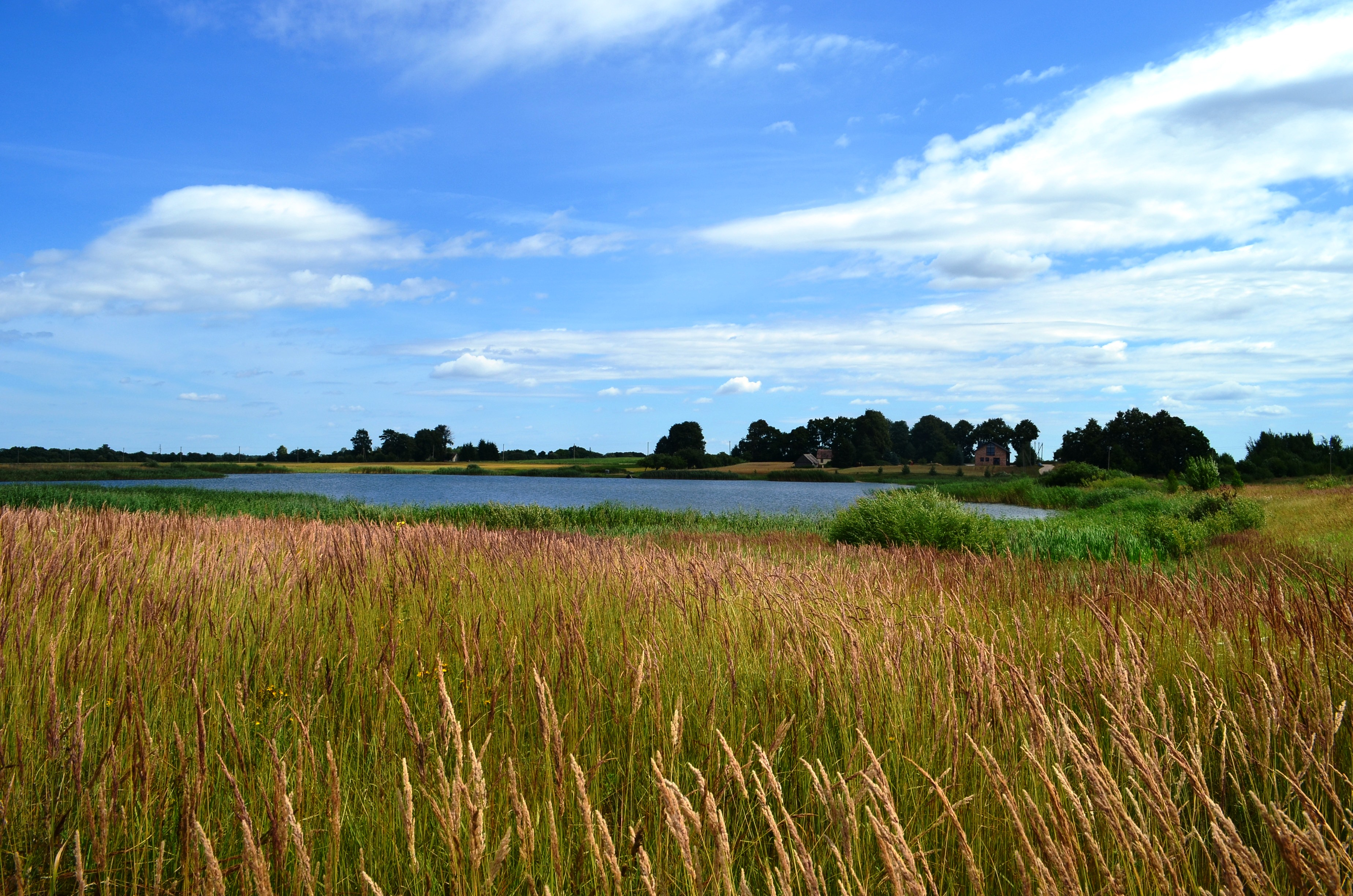 Pėdžių tvenkinys. Kėdainių raj.